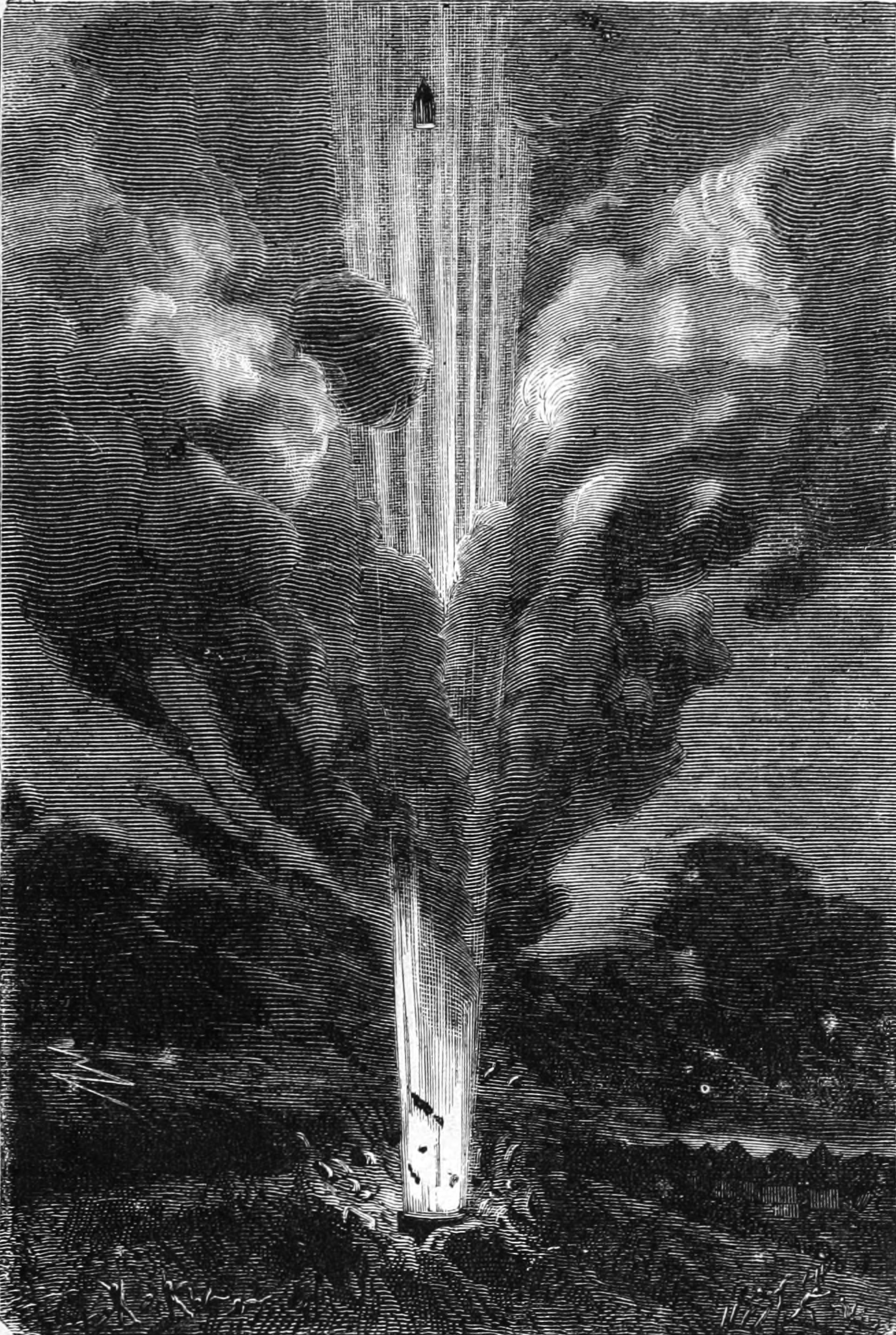 De la terre à la lune